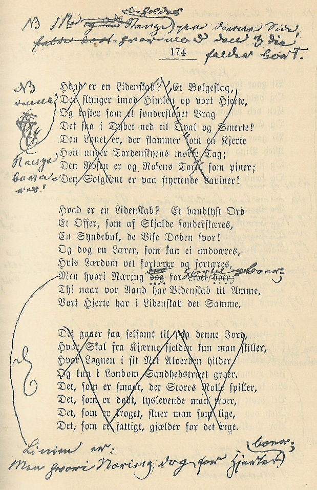 Frederik Paludan Müllers håndskrift. Paludan Müllers egenhændige rettelser i et eksemplar af hans "Adam Homo" (5. udgave, 1873) til en senere udgave.